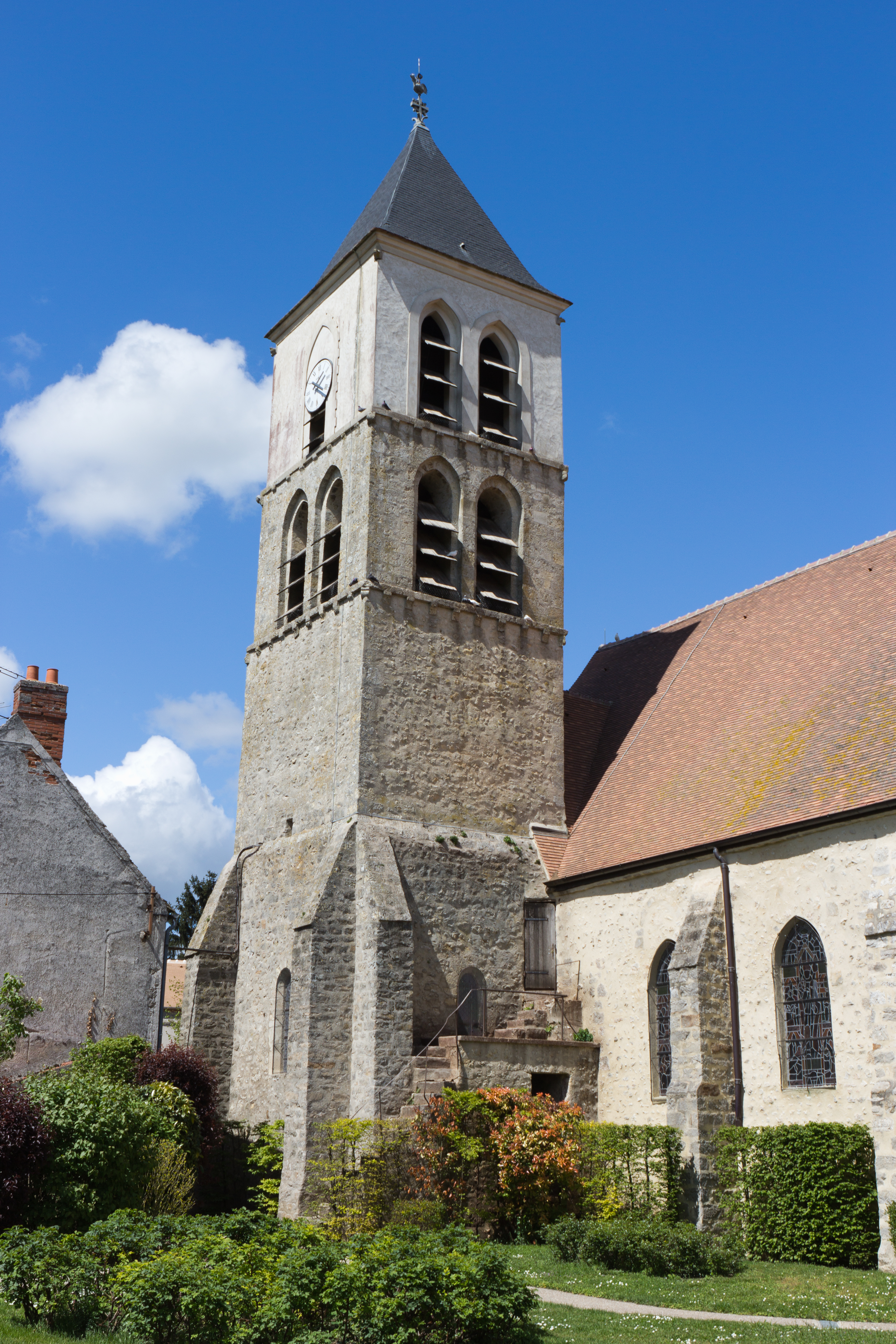 Église de Cerny, Cerny, département de l'Essonne, France.